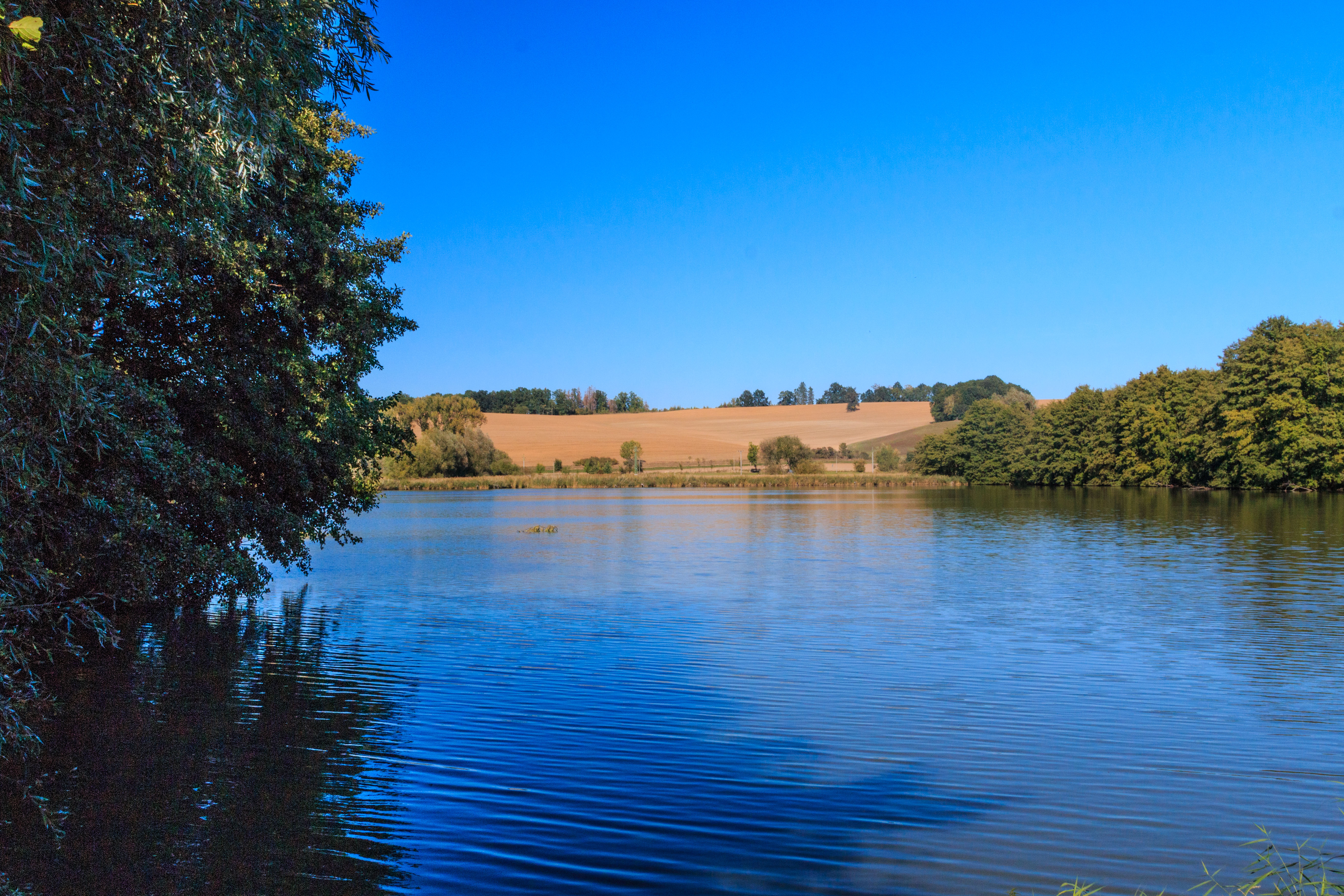 Buškovský rybník Project: Vodstvo